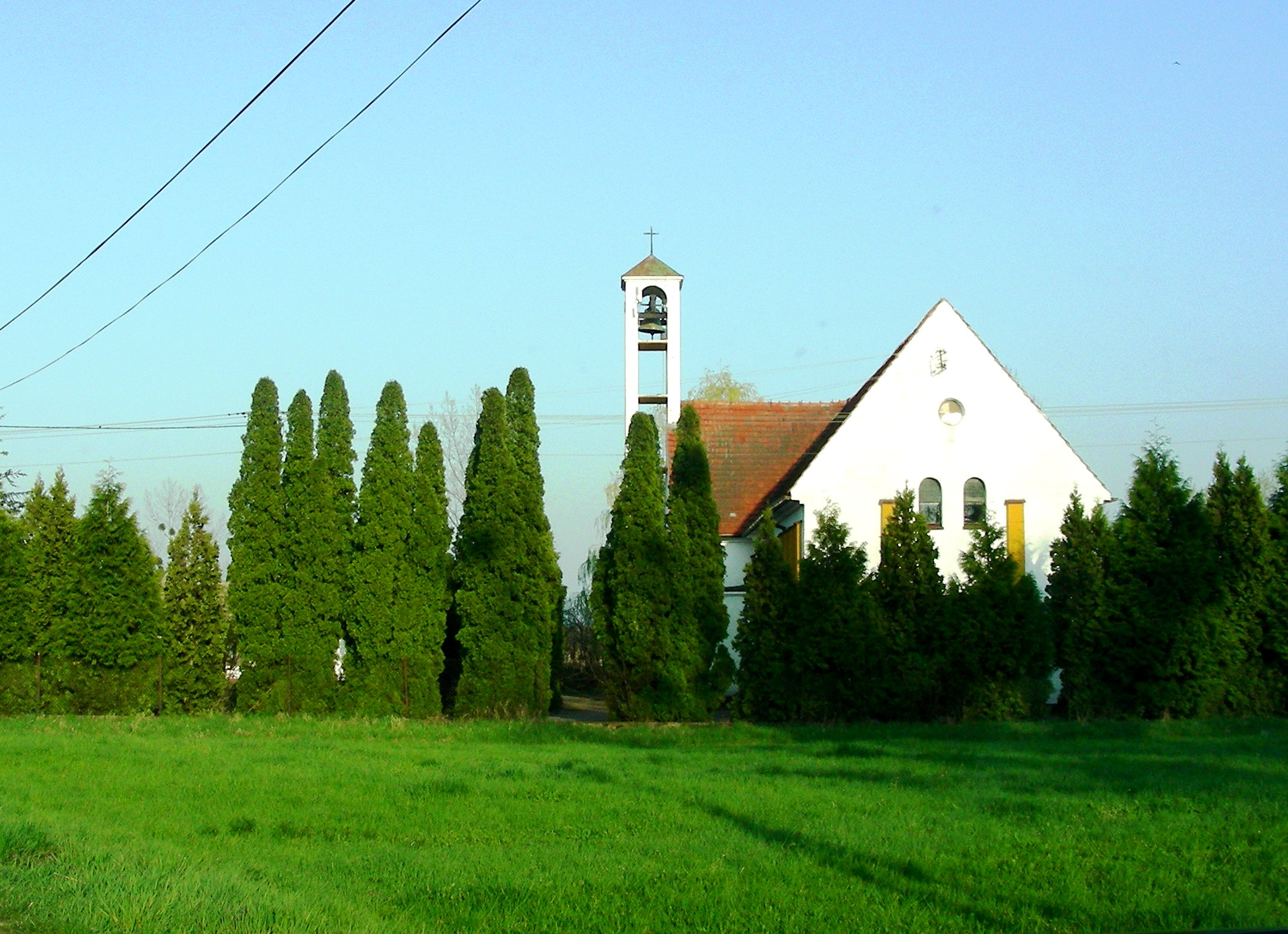 Kościół pod wezwaniem Najświętszego Serca Pana Jezusa, Golczowice, gmina Lewin Brzeski, powiat brzeski, województwo opolskie